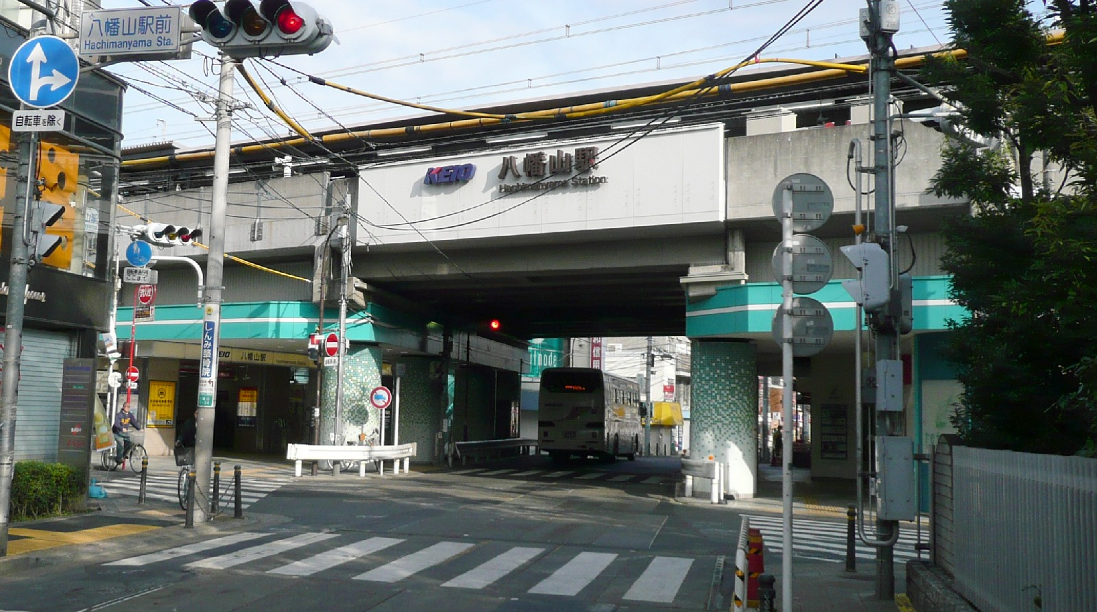 八幡山駅（駅南側から撮影）